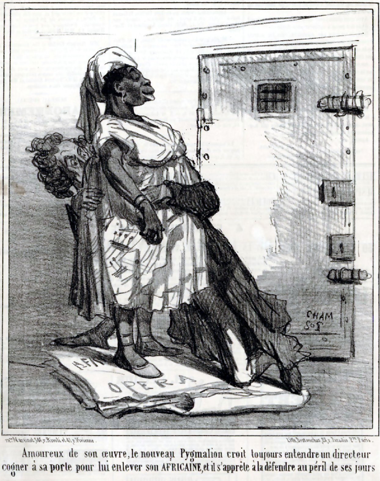 Caricature de Cham sur L'Africaine de Meyerbeer